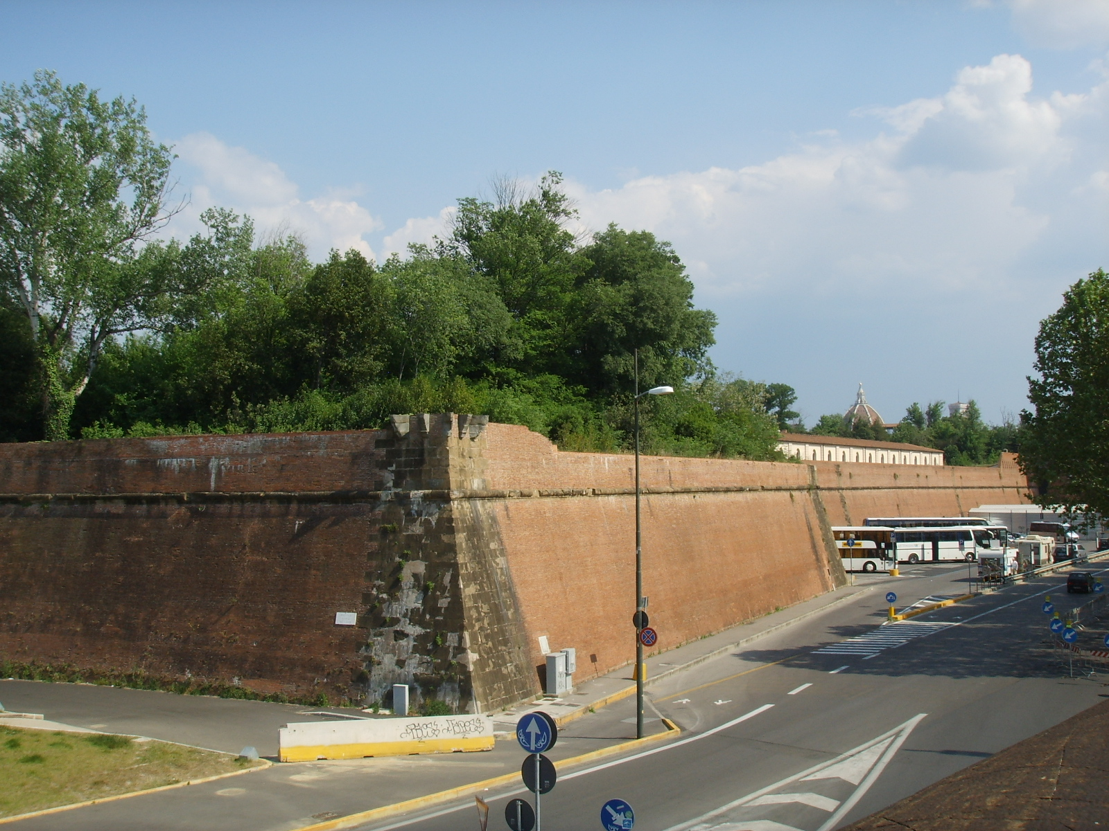 Mura della(Firenze).